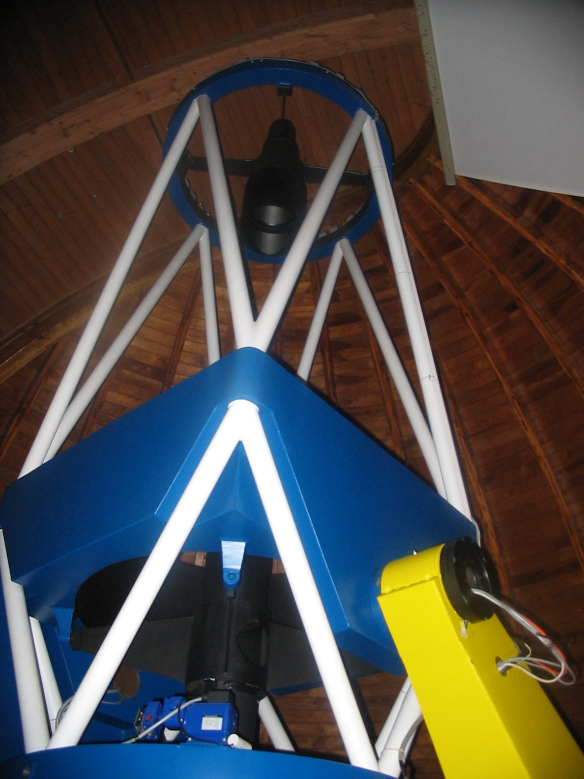 Das 1m-Teleskop am Hohen List